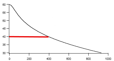 Průběh hlučnosti větrné turbíny REpower v závislosti na vzdálenosti